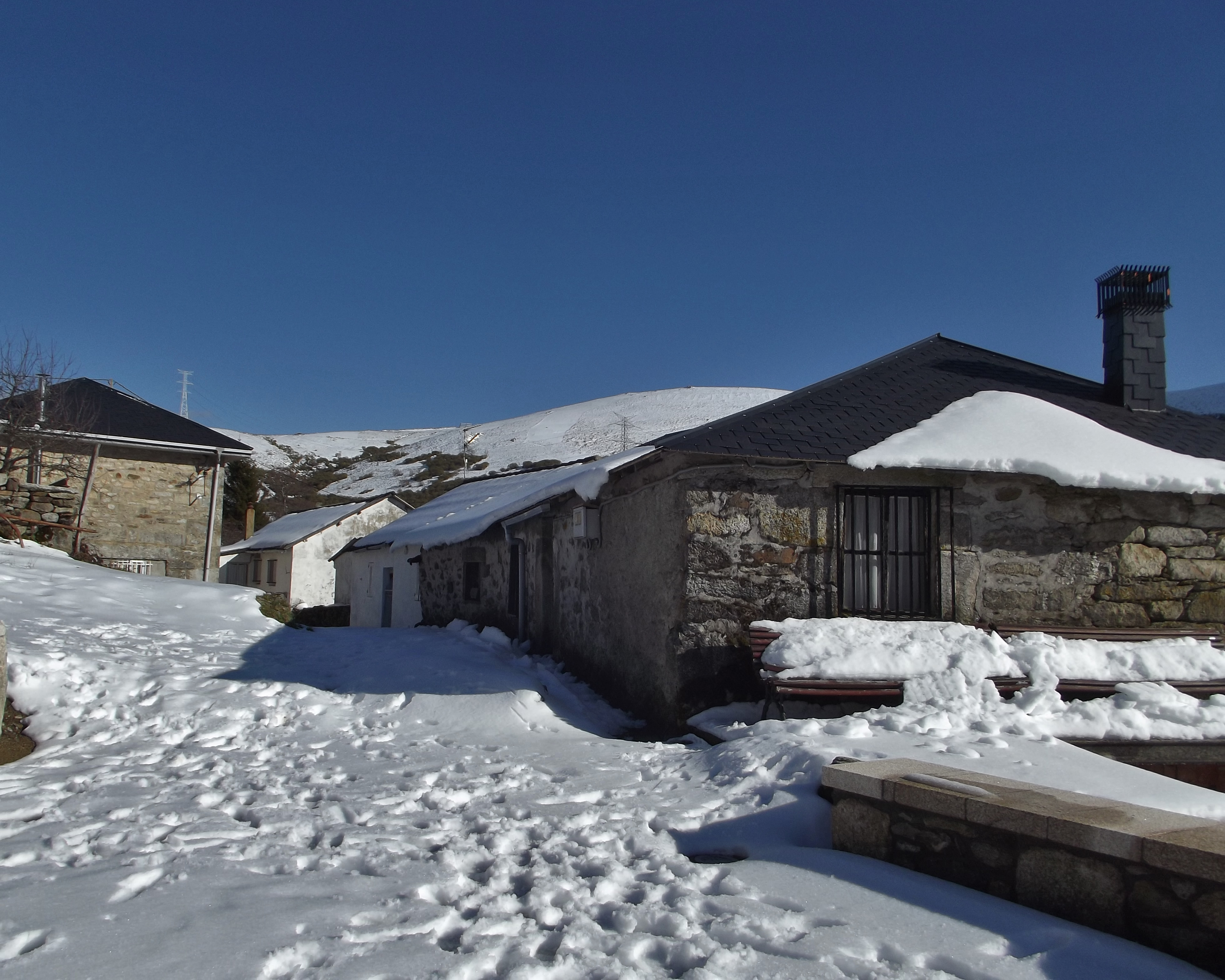 Padornelo es una localidad española del municipio de Lubián, en la provincia de Zamora (Castilla y León). Se encuentra situado en la comarca de Sanabria, y dentro de ella en la considerada Alta Sanabria. Es una de las pocas localidades bilingües de la provincia de Zamora, ya que sus habitantes utilizan habitualmente el idioma castellano y el idioma gallego.(Wikipedia)